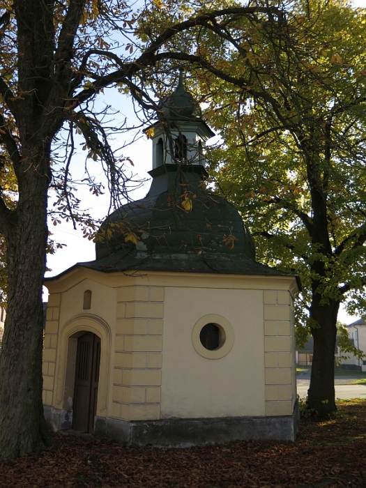 Kaplička, náves, Tatiná.